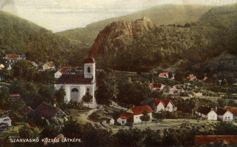 Szarvaskő látképe, a Major-tetői hegy felől, az 1910-es években.